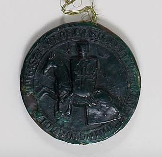 Raymond VII, comte de Toulouse